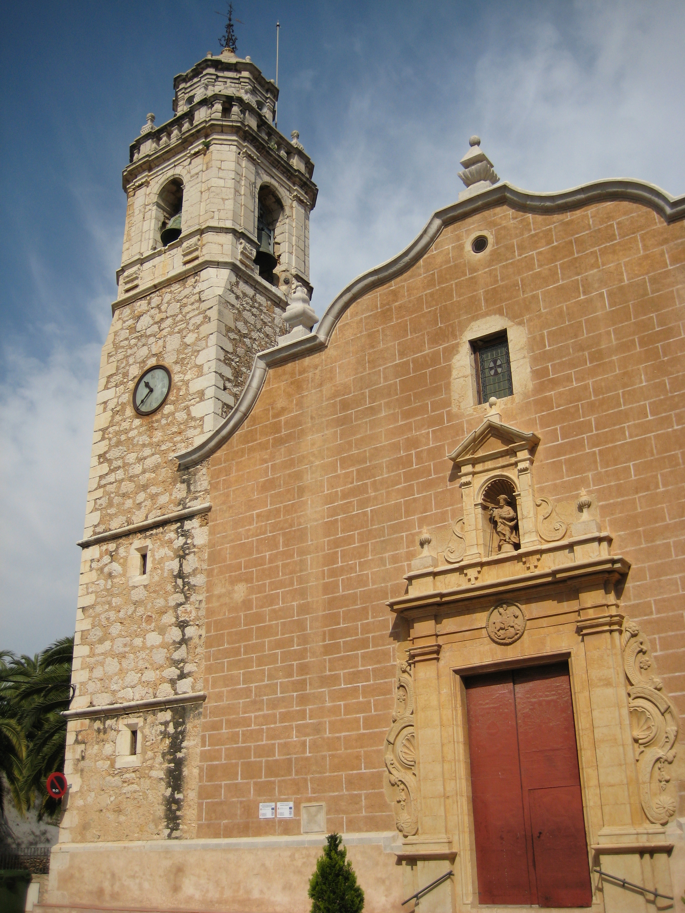 Església de Sant Jaume en Sant Jordi del Maestrat (Baix Maestrat)